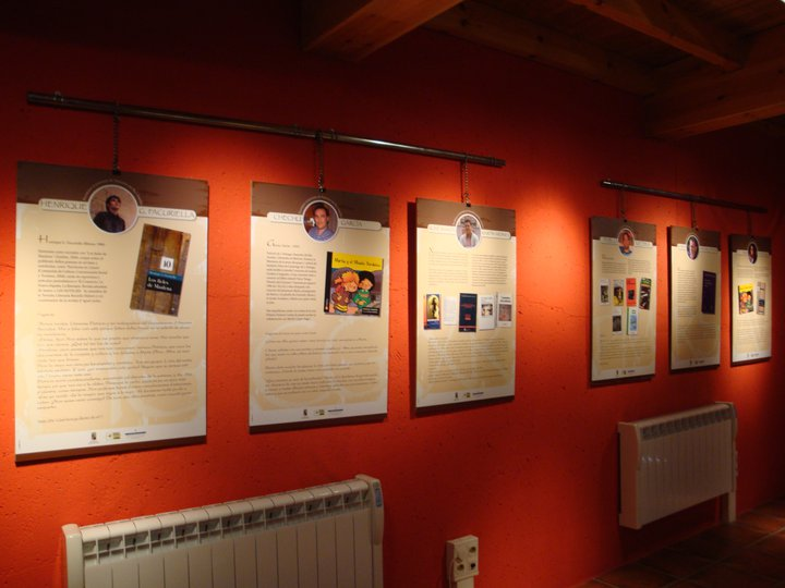 Esposición sobre los escritores de Samartín del Rei Aurelio